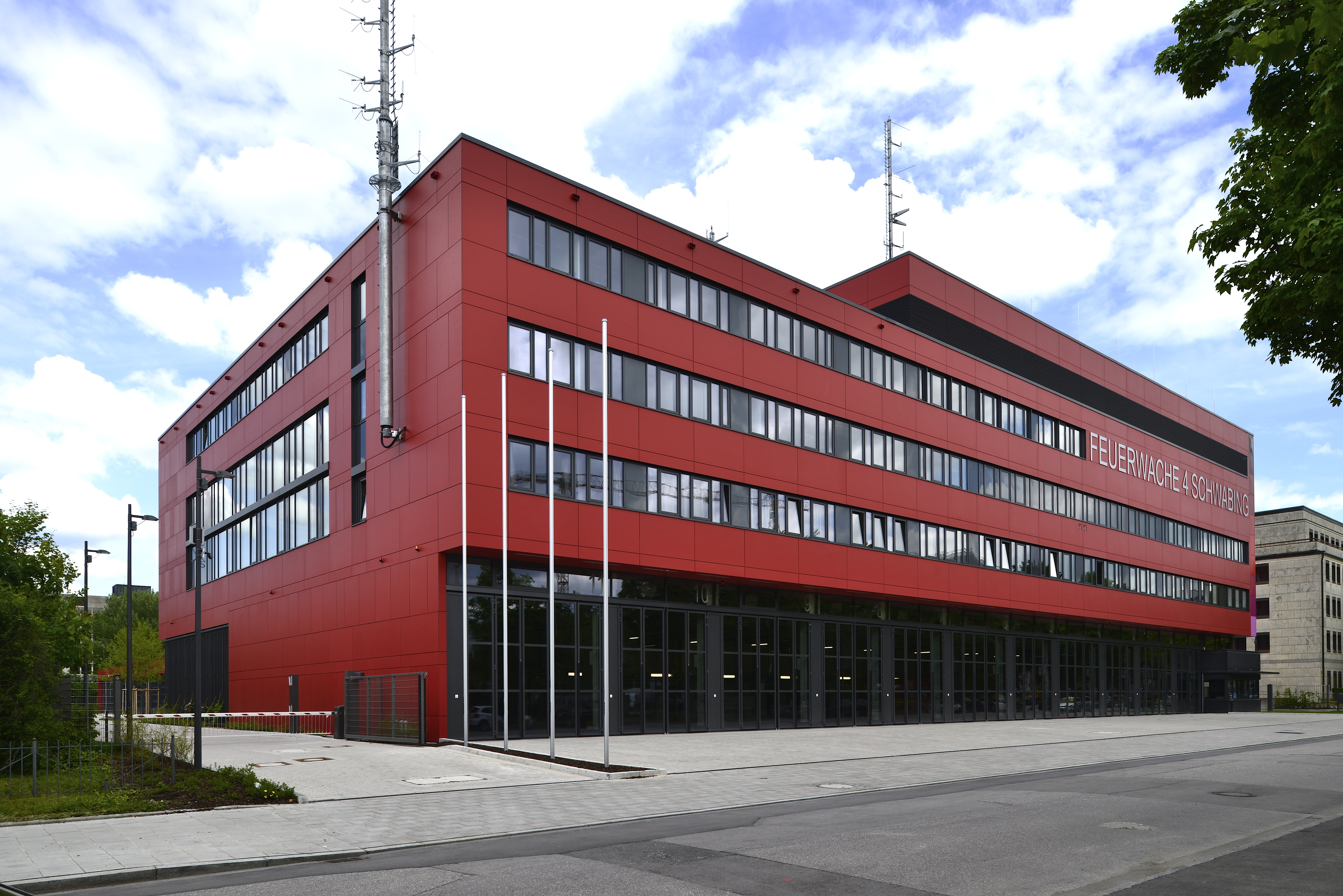 München, Schwabing, Hessstraße 12, Feuerwache 4, Eröffnet am 1. Juni 2016. Rechteckbolzen.